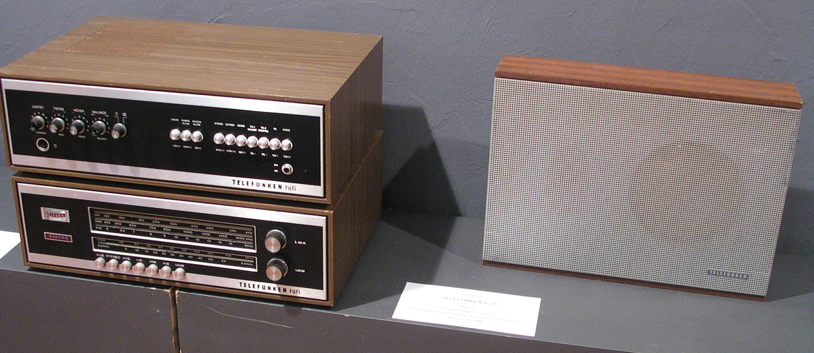 Telefunken Hifi-Anlage von 1969